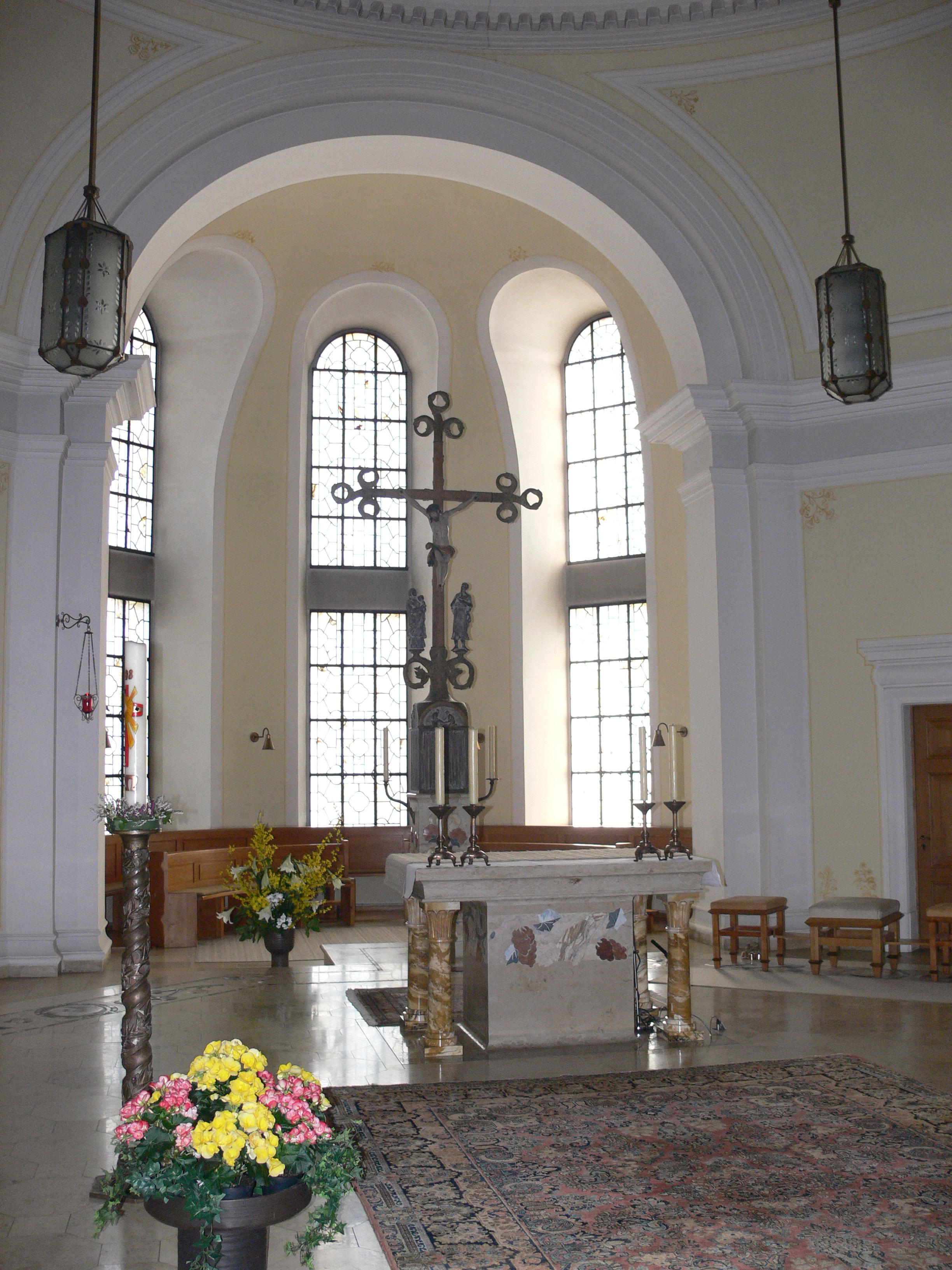 Abtei St. Erentraud, Kellenried, 88276 Berg, Landkreis Ravensburg Klosterkirche Altarinsel